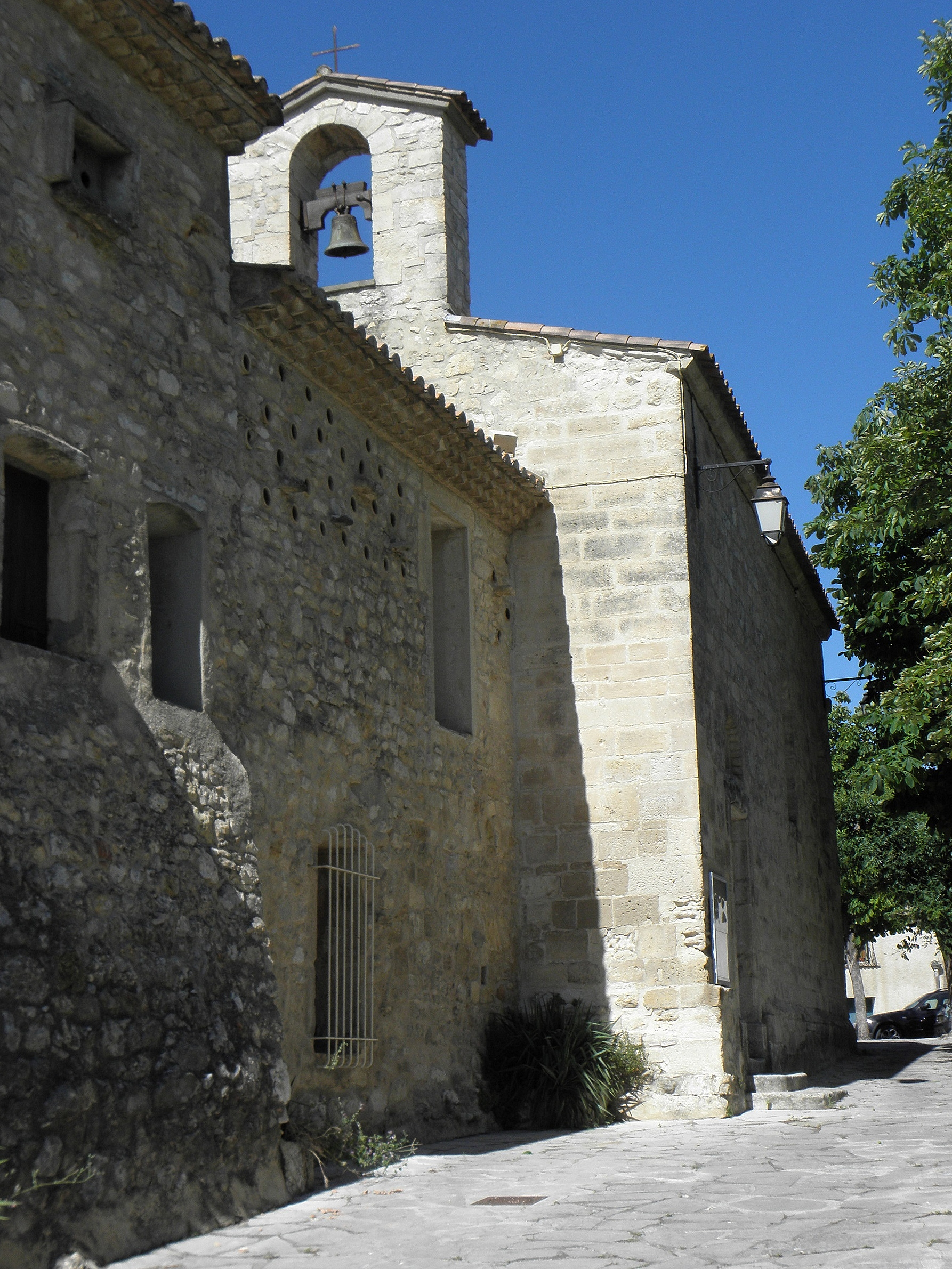 Église Saint-Michel de Guzargues (34). Façade occidental et flanc sud.